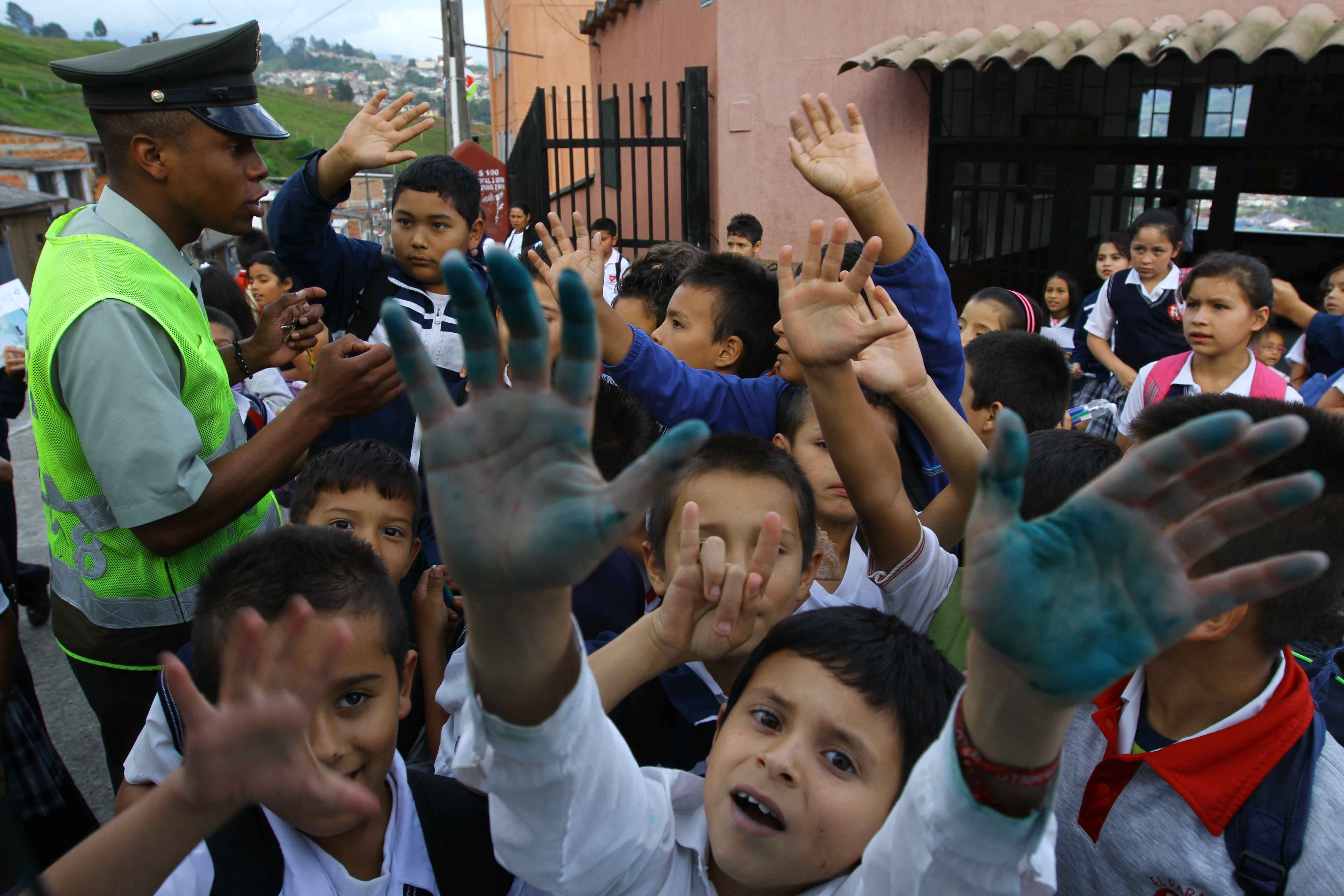 El humanismo policial incrementa la valoración de riesgos y el liderazgo en seguridad ciudadana. Colegio Fe y Alegría. Manizales, Caldas. Fotografía Santiago Escobar Jaramillo